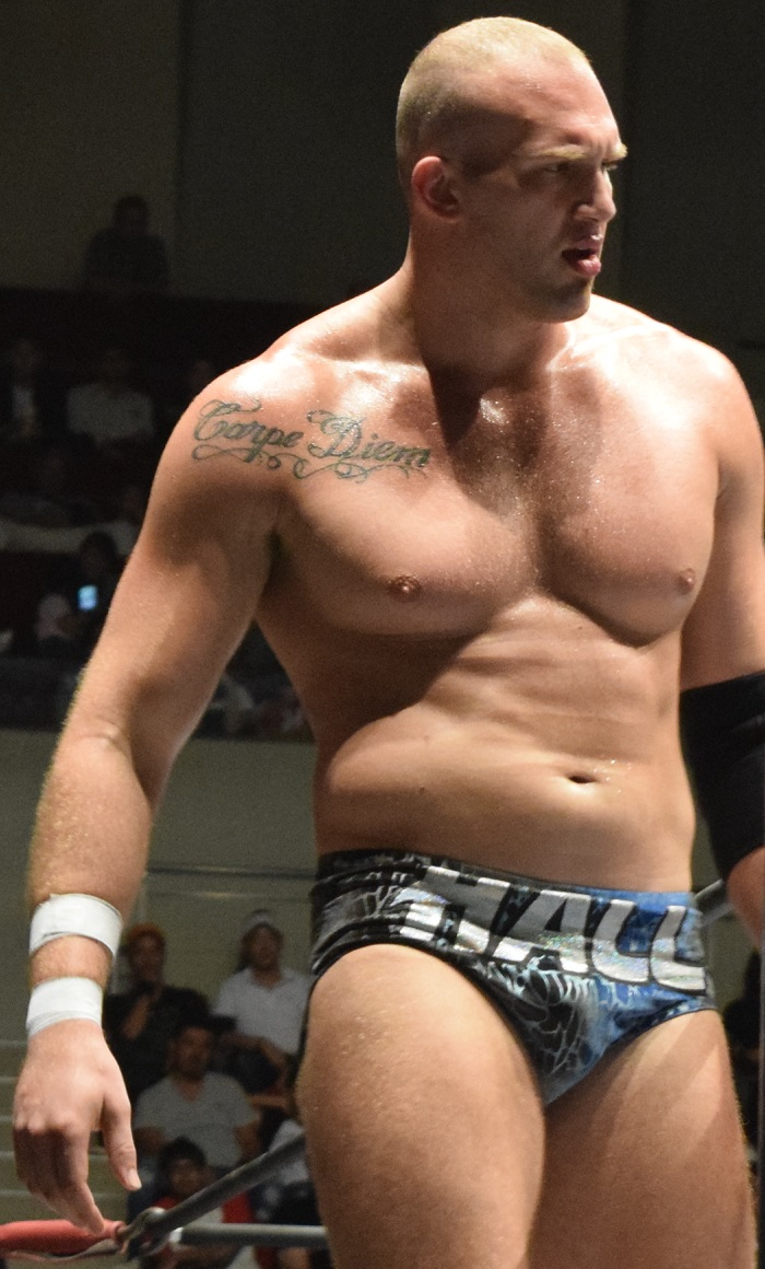 2015年9月27日 ワールド記念ホール「DESTRUCTION in KOBE」 コーディ・ホール